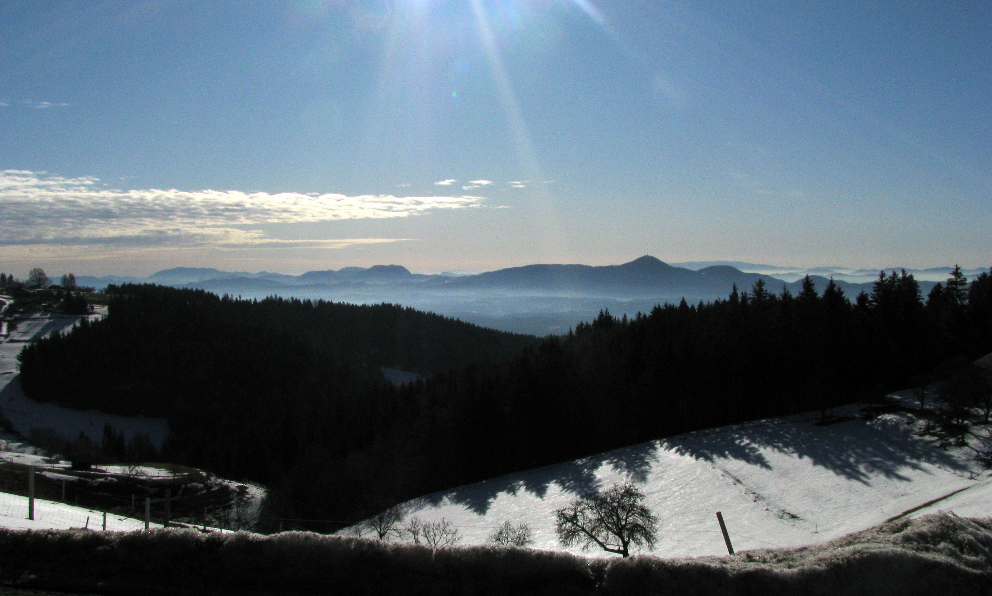 Boč, Donačka in Ivančica